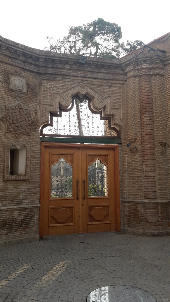 خانه اتحادیه - لاله زار تهران